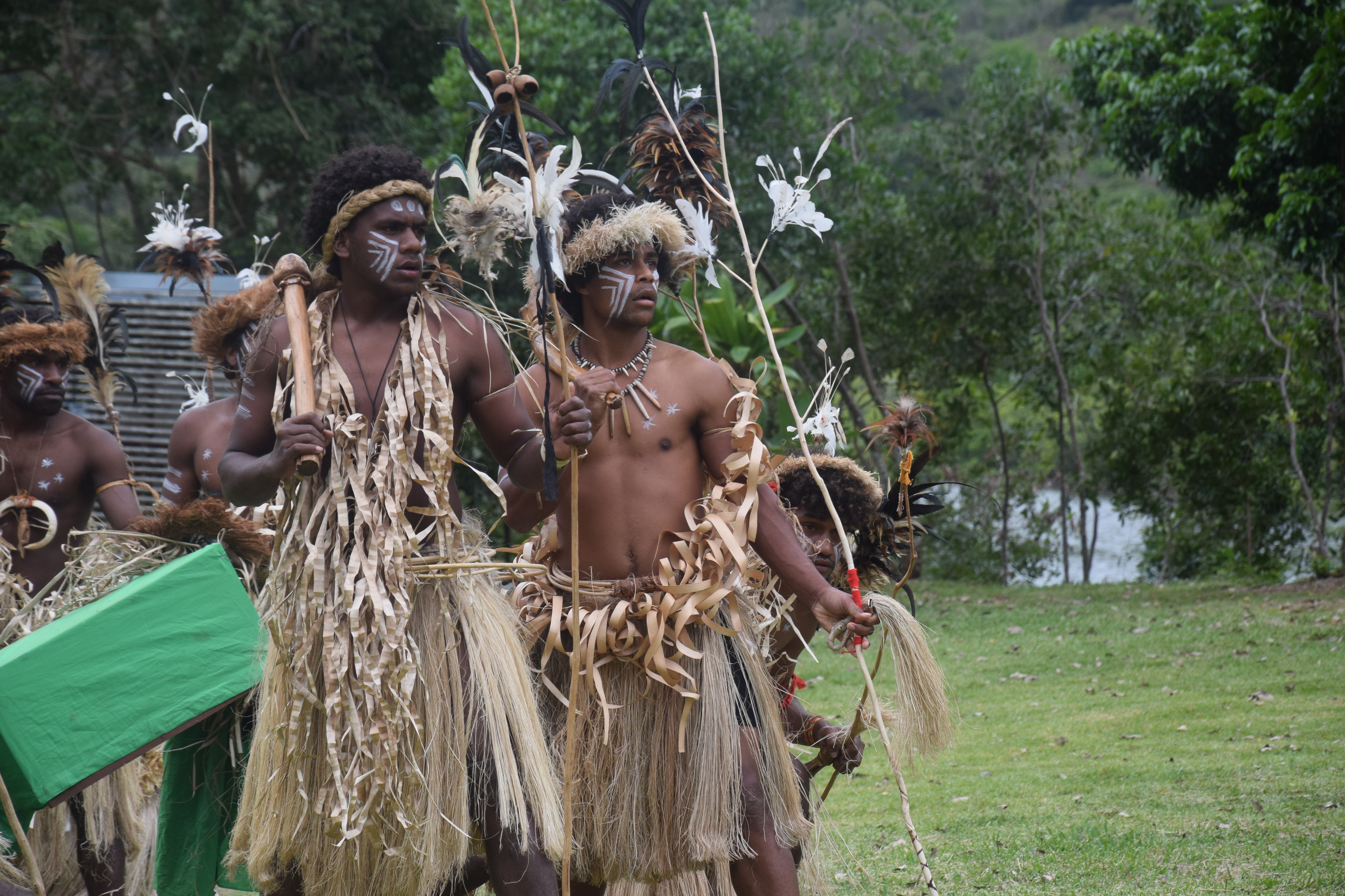 Ci-dessus, les danseurs de "BUA" lors du festival waan-dance en 2015.